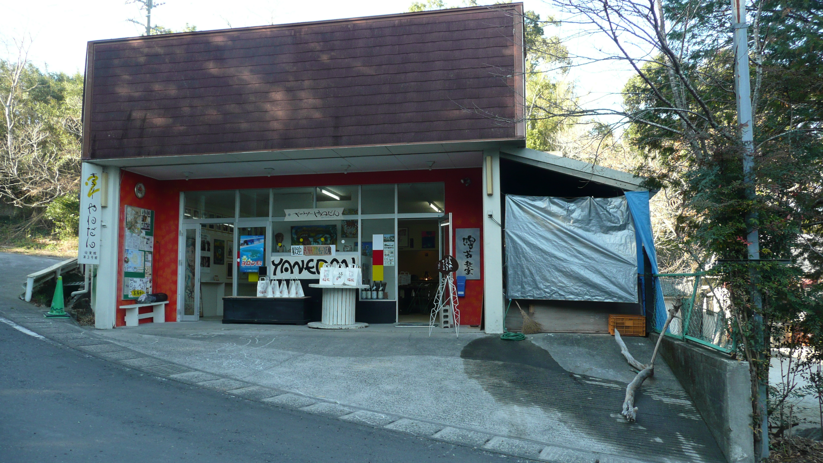 ギャラリーやねだん（迎賓館第3号館、鹿児島県鹿屋市串良町柳谷集落）